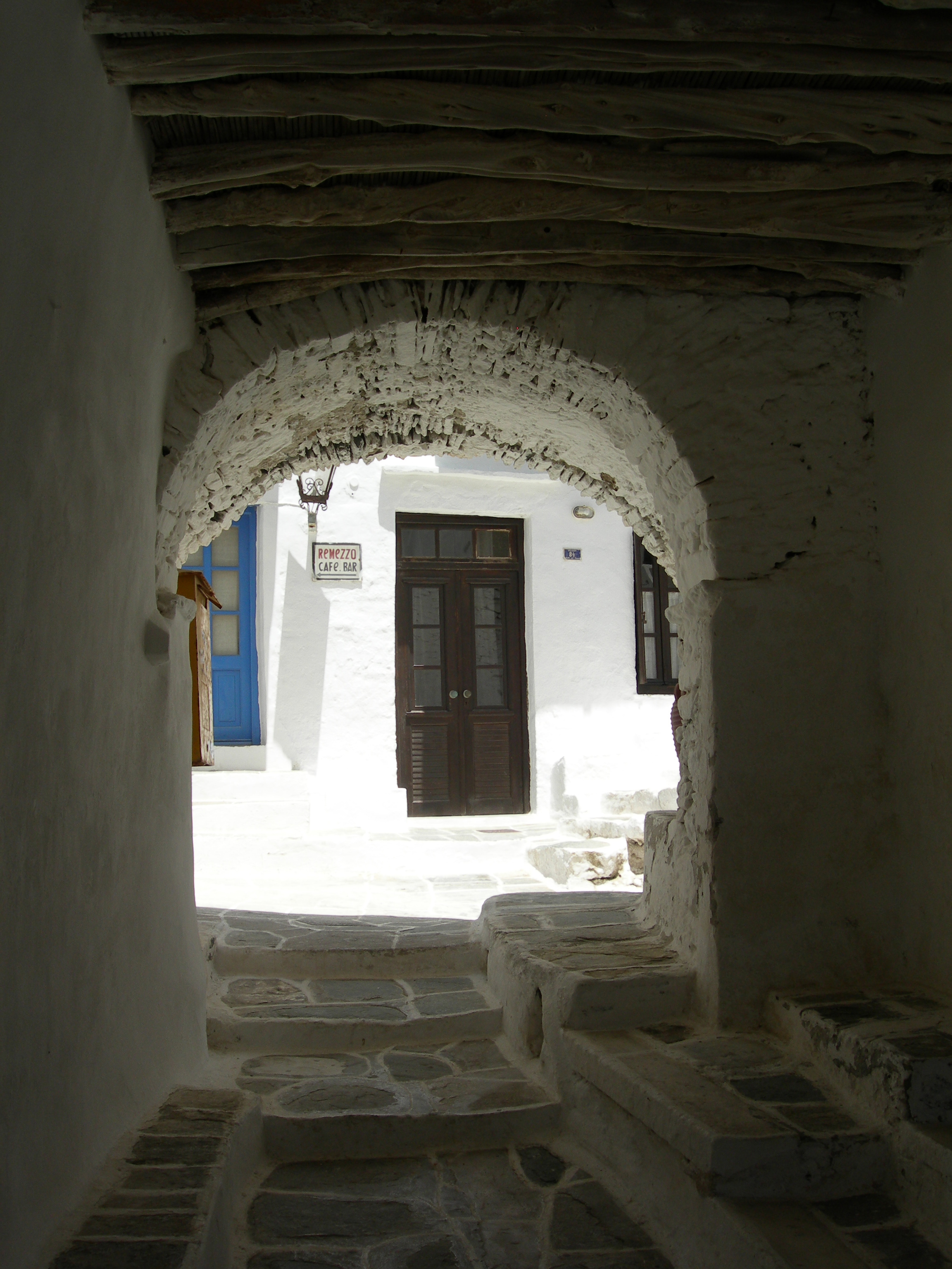 Une des entrées de Kastro à Sifnos